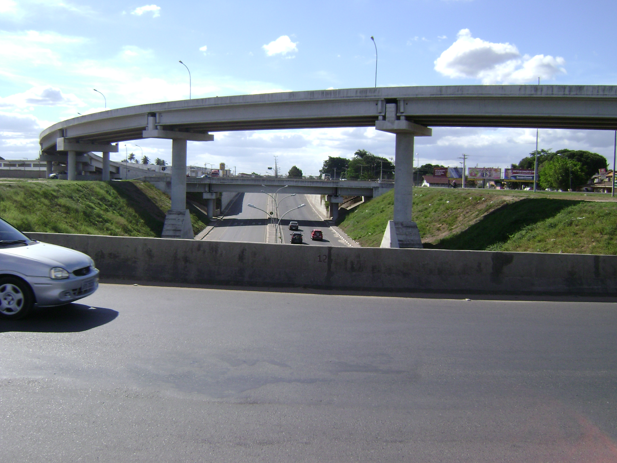 Vista do Complexo Rodoviário José Ronaldo de Carvalho, em Feira de Santana, Bahia, Brasil.